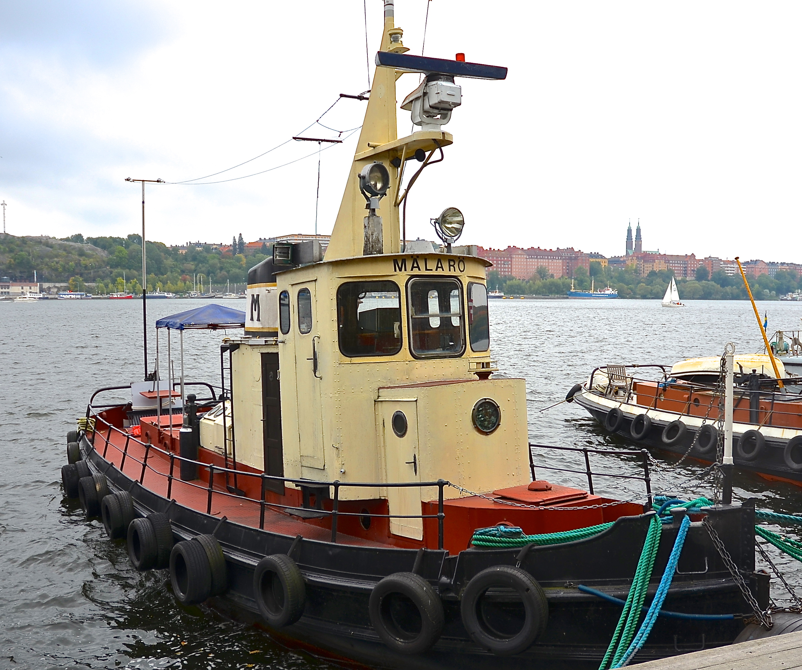 Bogserbåten Mälarö vid kaj på Norrmälarstrand i Stockholm This is an image of the protected Swedish ship Bogserbåten Mälarö, with call sign SFB 5339 .